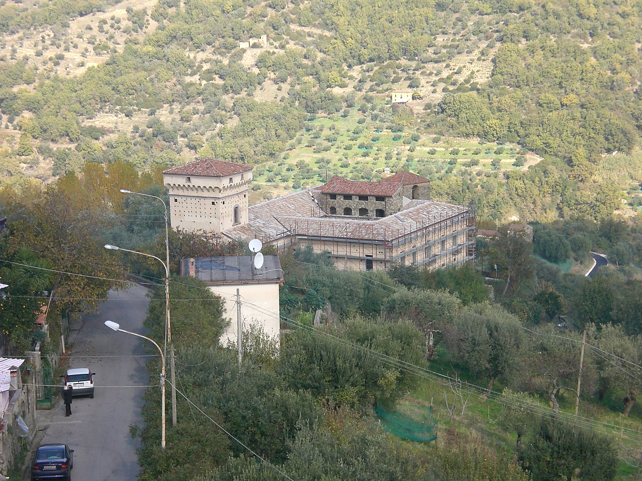 Palazzo Coppola a Valle Cilento